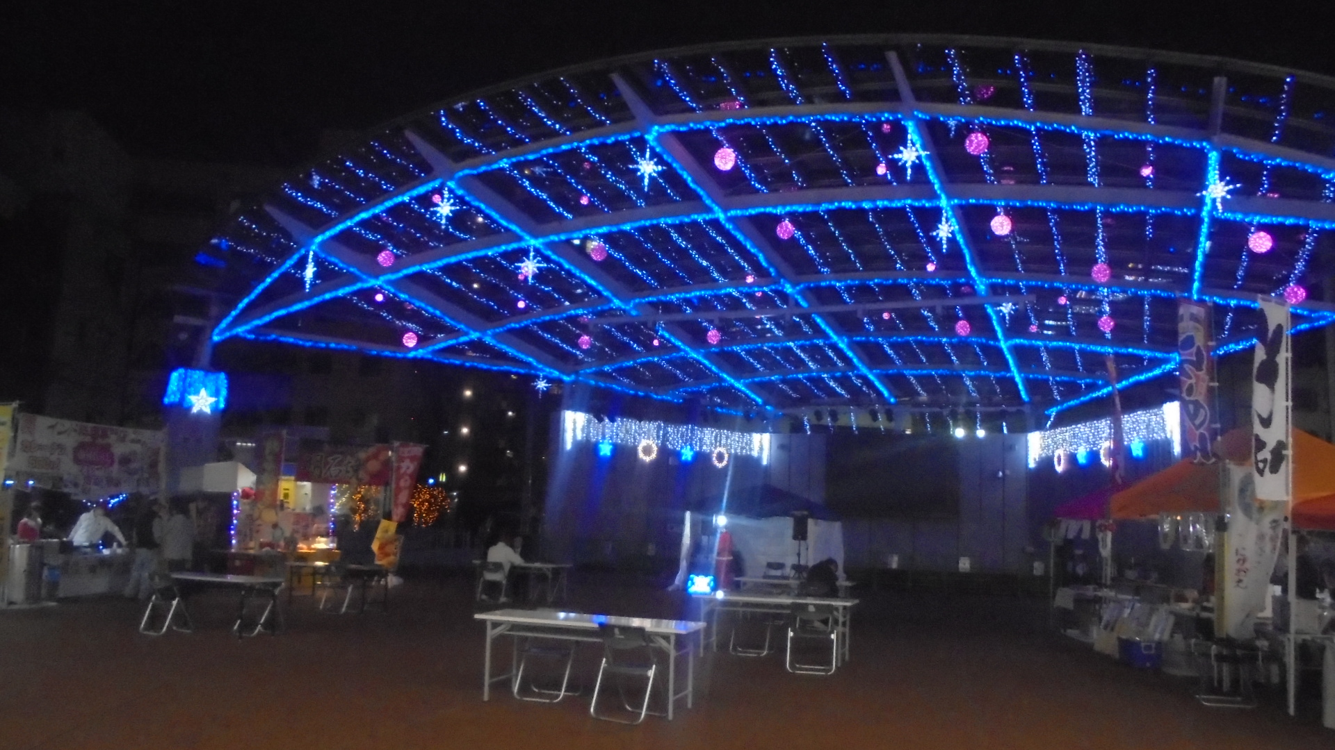 冬季ライトアップ実施中のオリオンスクエア